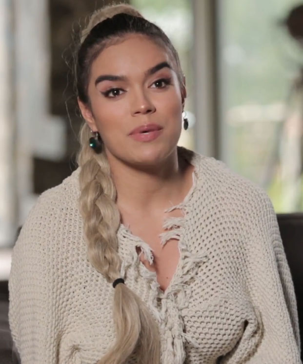 Entrevista de Karol G